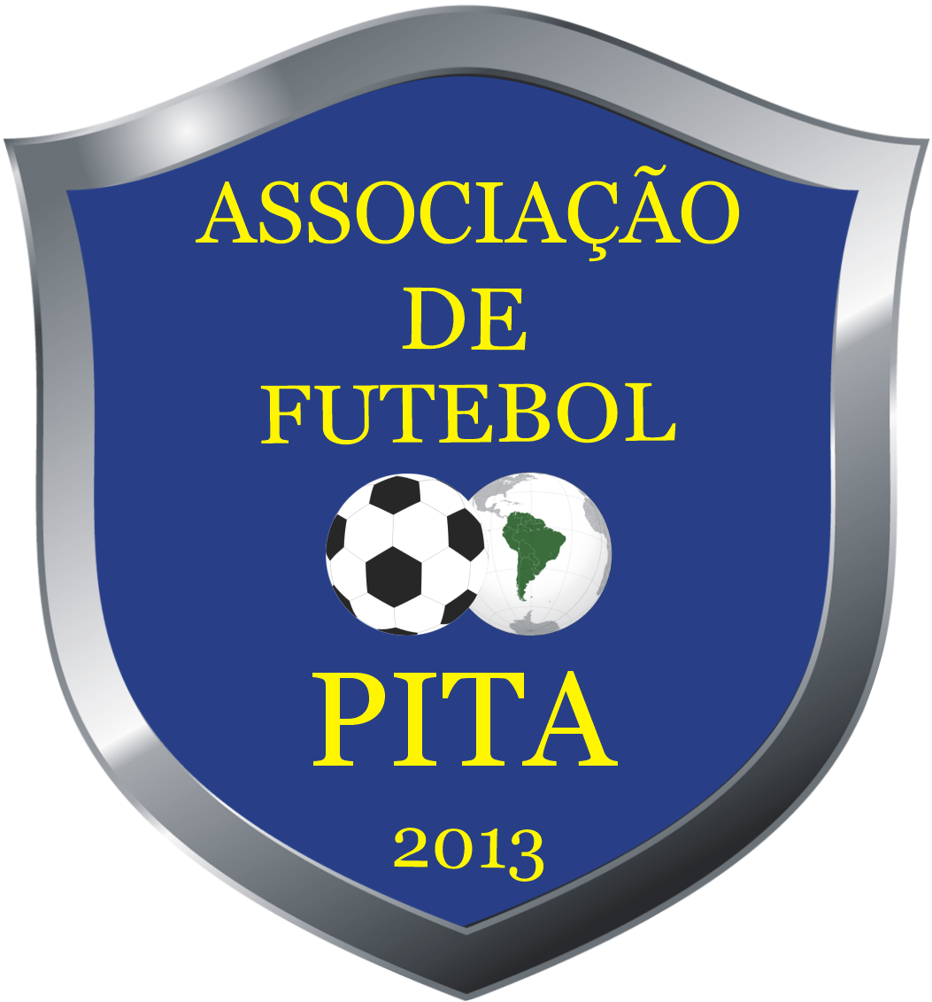 escudo pita